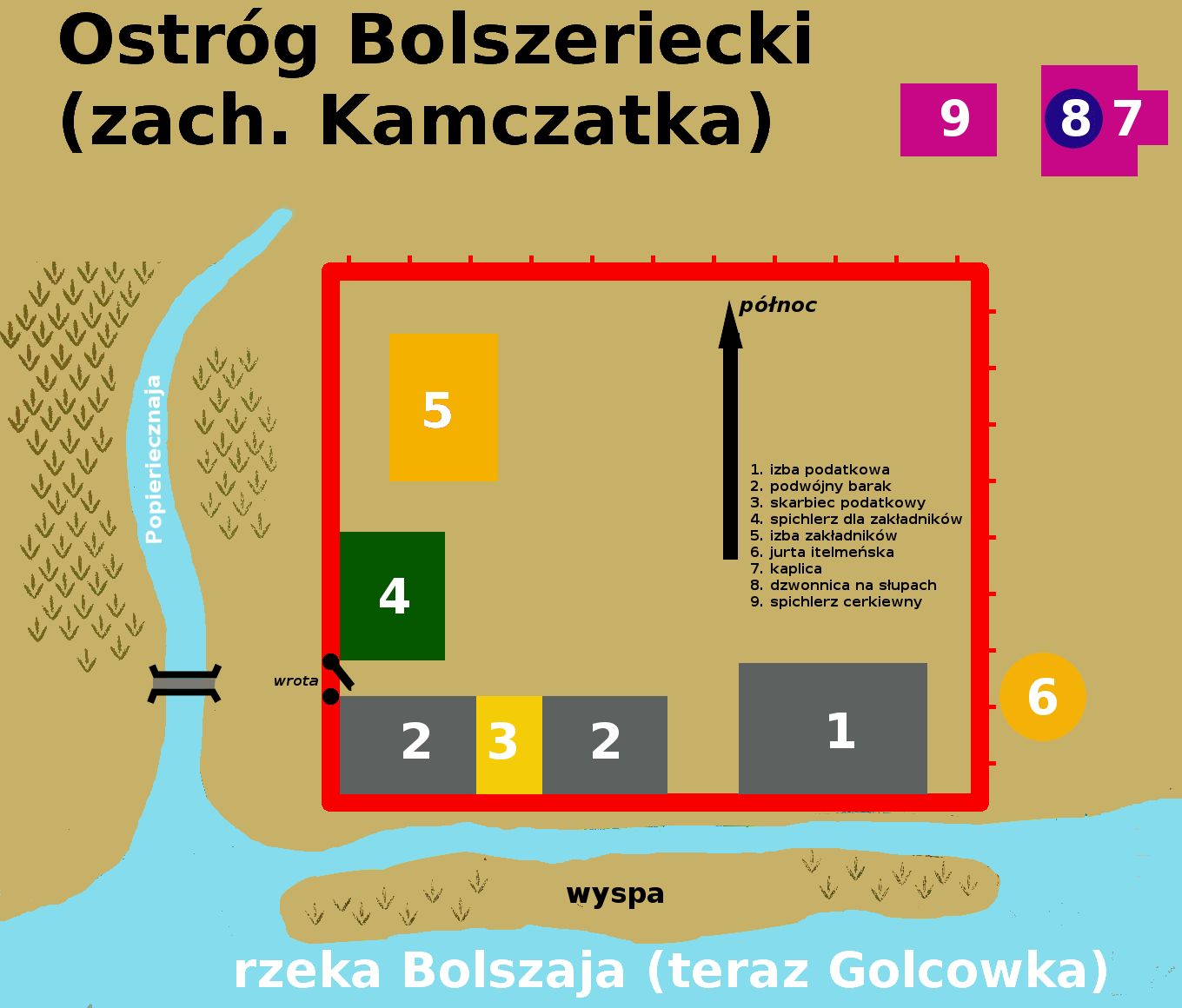 Schematyczny plan Bolszerieckiego Ostroga, założonego w 1704 roku, sporządzony na podstawie zapisków z Kamczatki autorstwa S.P. Kraszeniennikowa (szkic wg rekonstrukcji znajdującej się w muzeum regionalnym w Ust'-Bolszeriecku)